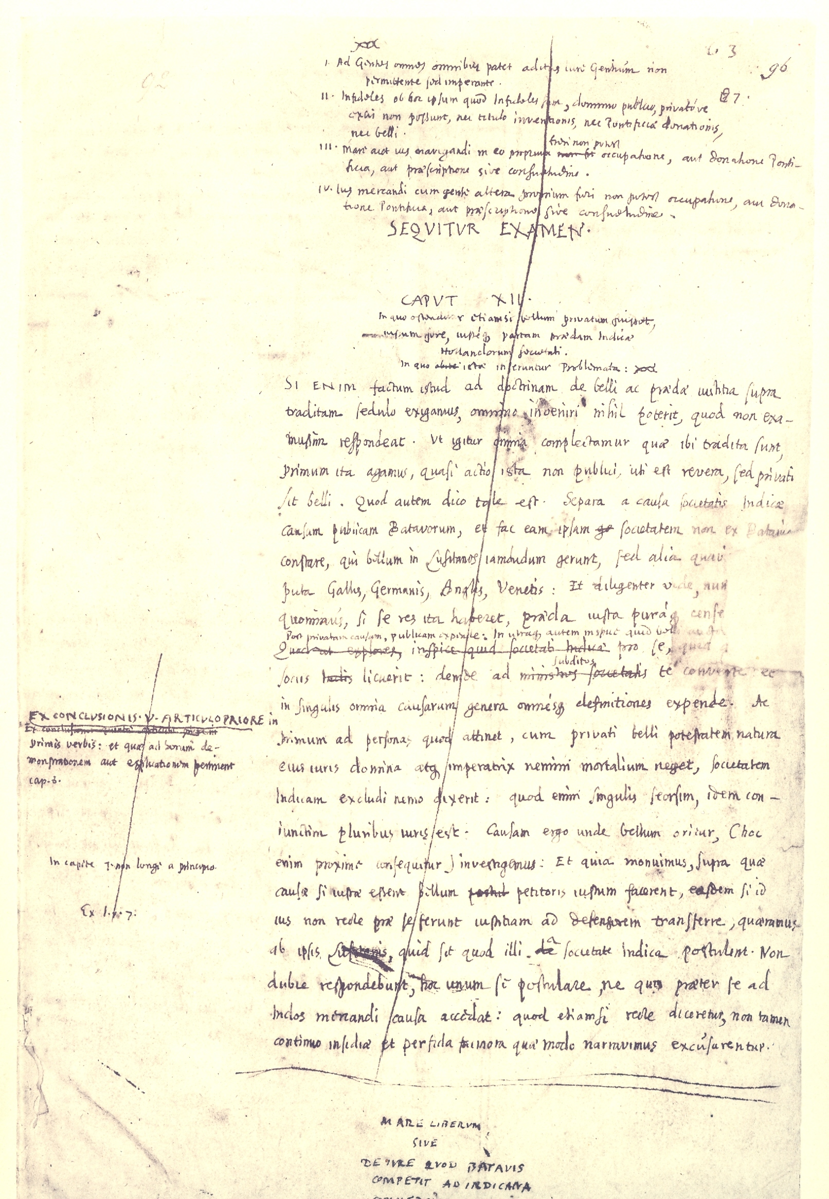 Grotius, De jure praedae 1604